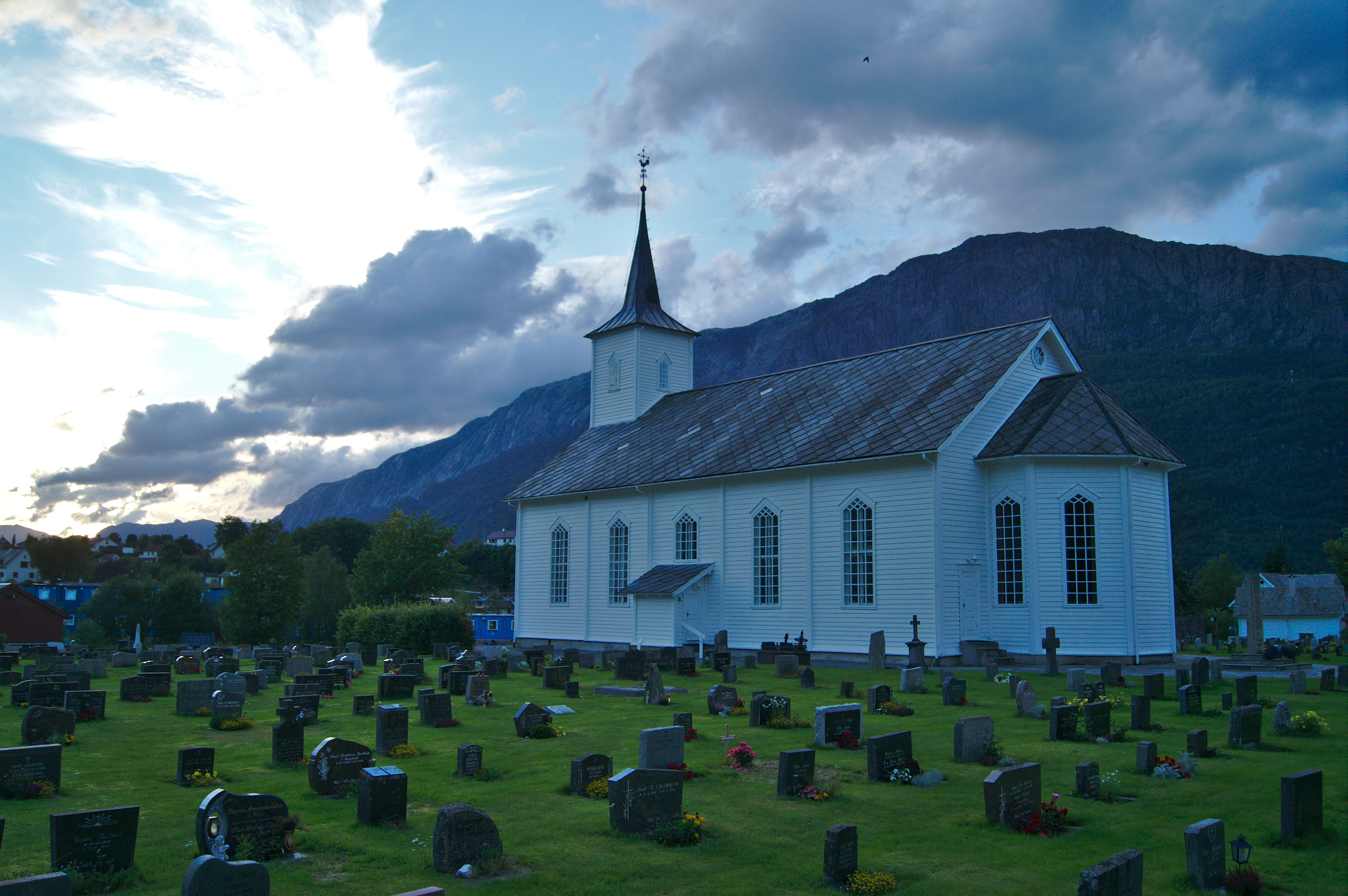 The church in Dale i Sunnfjord